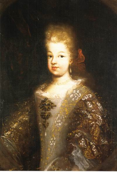 Maria Luisa von Savoyen (1688-1714)